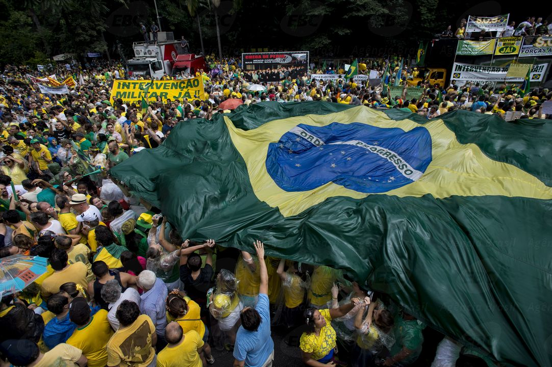 Manifestantes na cidade de São Paulo pedem o impeachment da presidente Dilma Rousseff.